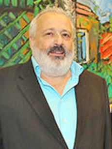 Vernissage „L'OEuvre – Études“ in der Sparkasse AG, Horn, Niederöstereich. Akademischer Künstler Helmuth Gräff